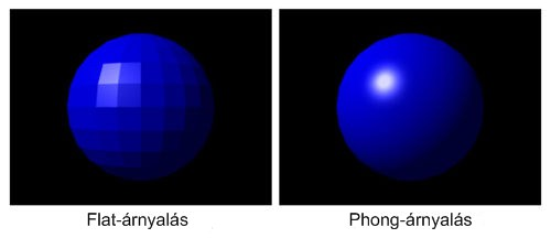 Példa, hogy hogyan működik a Phong-árnyalás